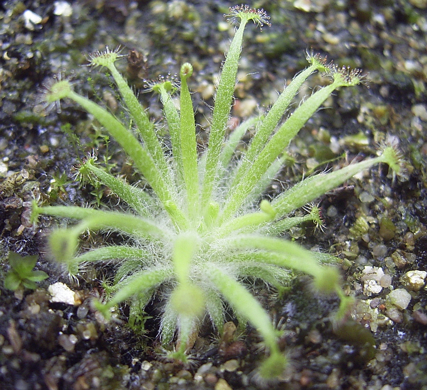 Habitus Drosera dilatato-petiolaris (juvenile plant)